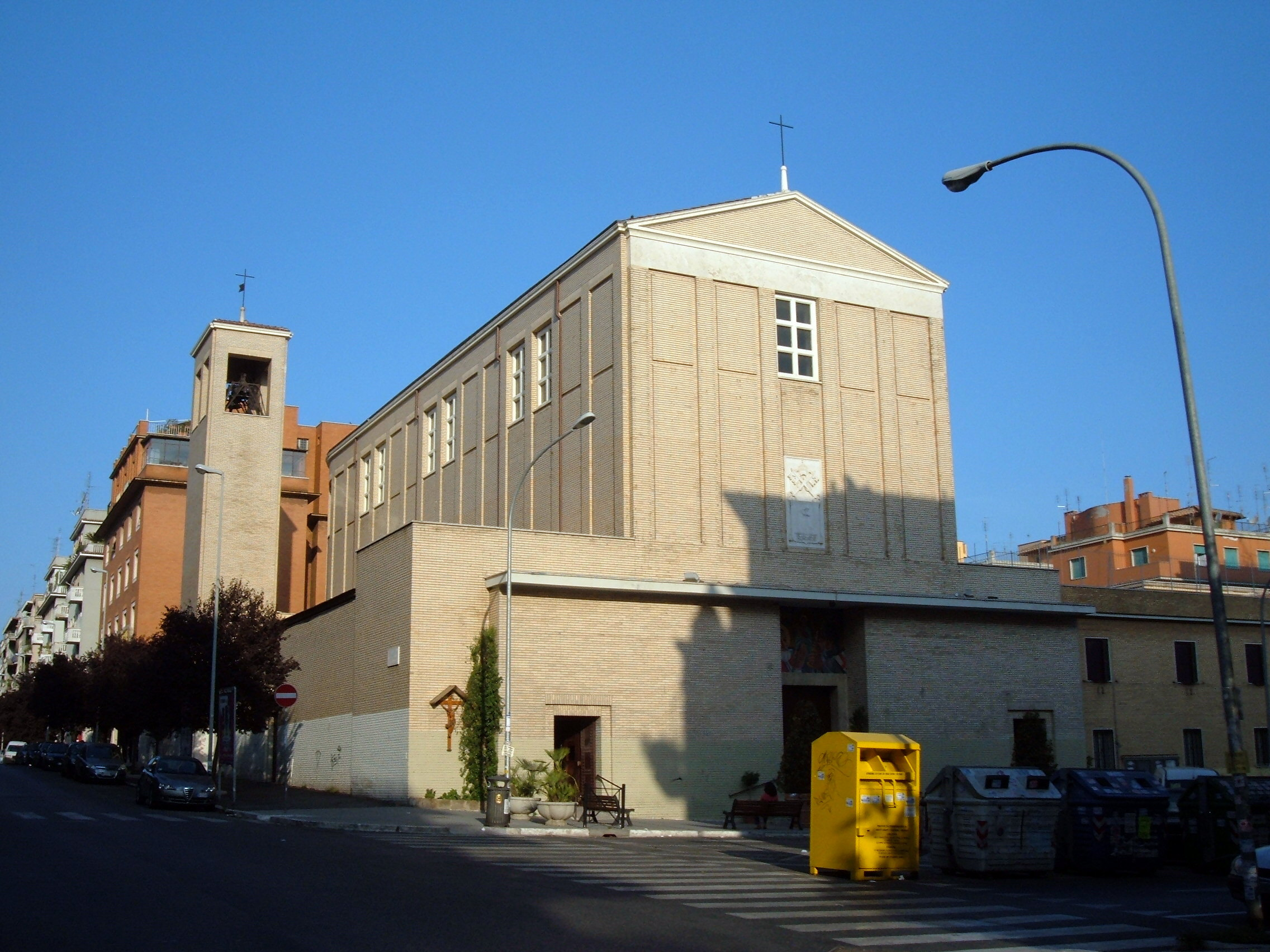 Chiesa di San Pio V, a Roma, nel quartiere Aurelio.